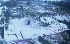 Le site archéologique de Giono-Apsarus, en Géorgie.